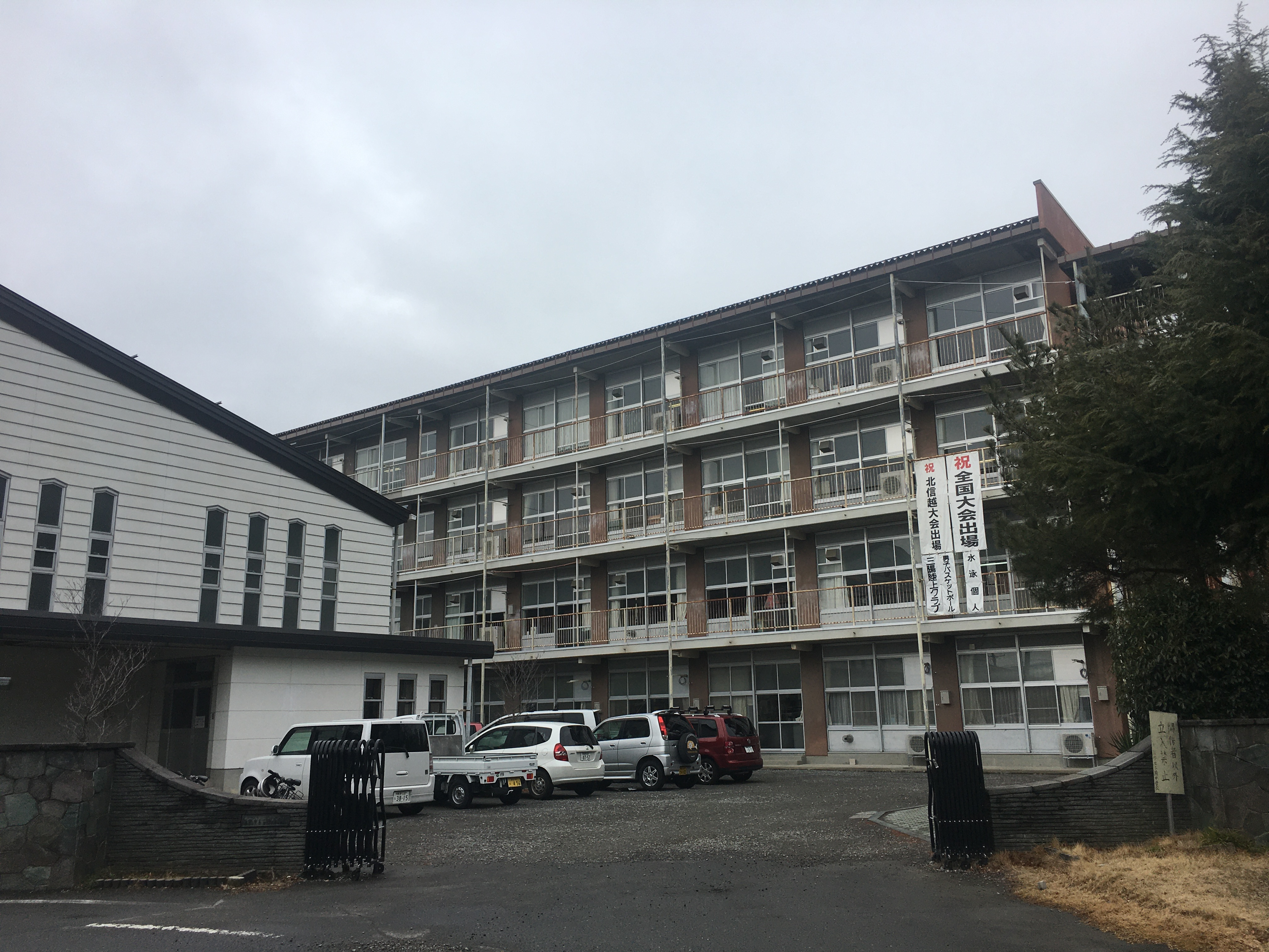 長野市立三陽中学校の校門前、体育館、南校舎の写真